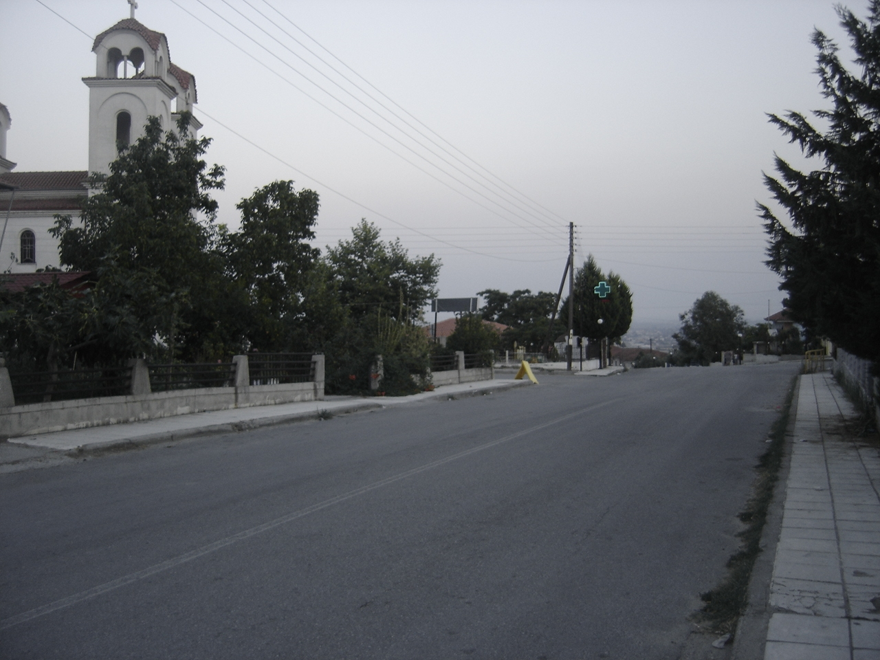 Road in Palio Keramidi.